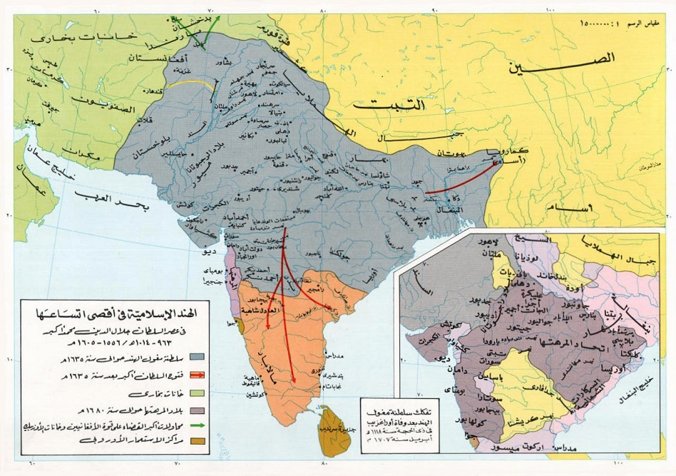 سلطنة مغول الهند خِلال عهد جلال الدين أكبر.